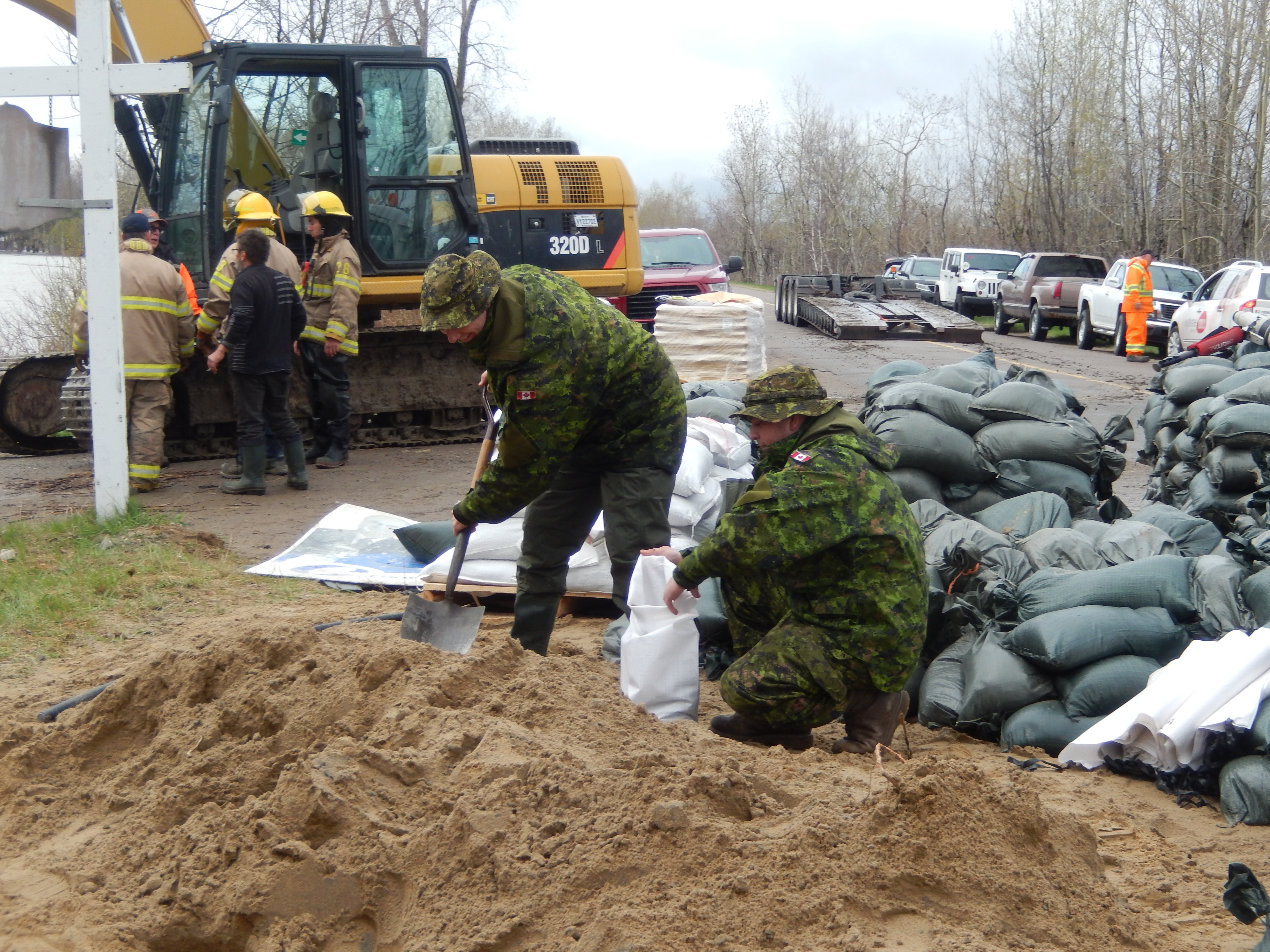 Soldats remplissant des sacs de sables à Yamachiche en mai 2017.